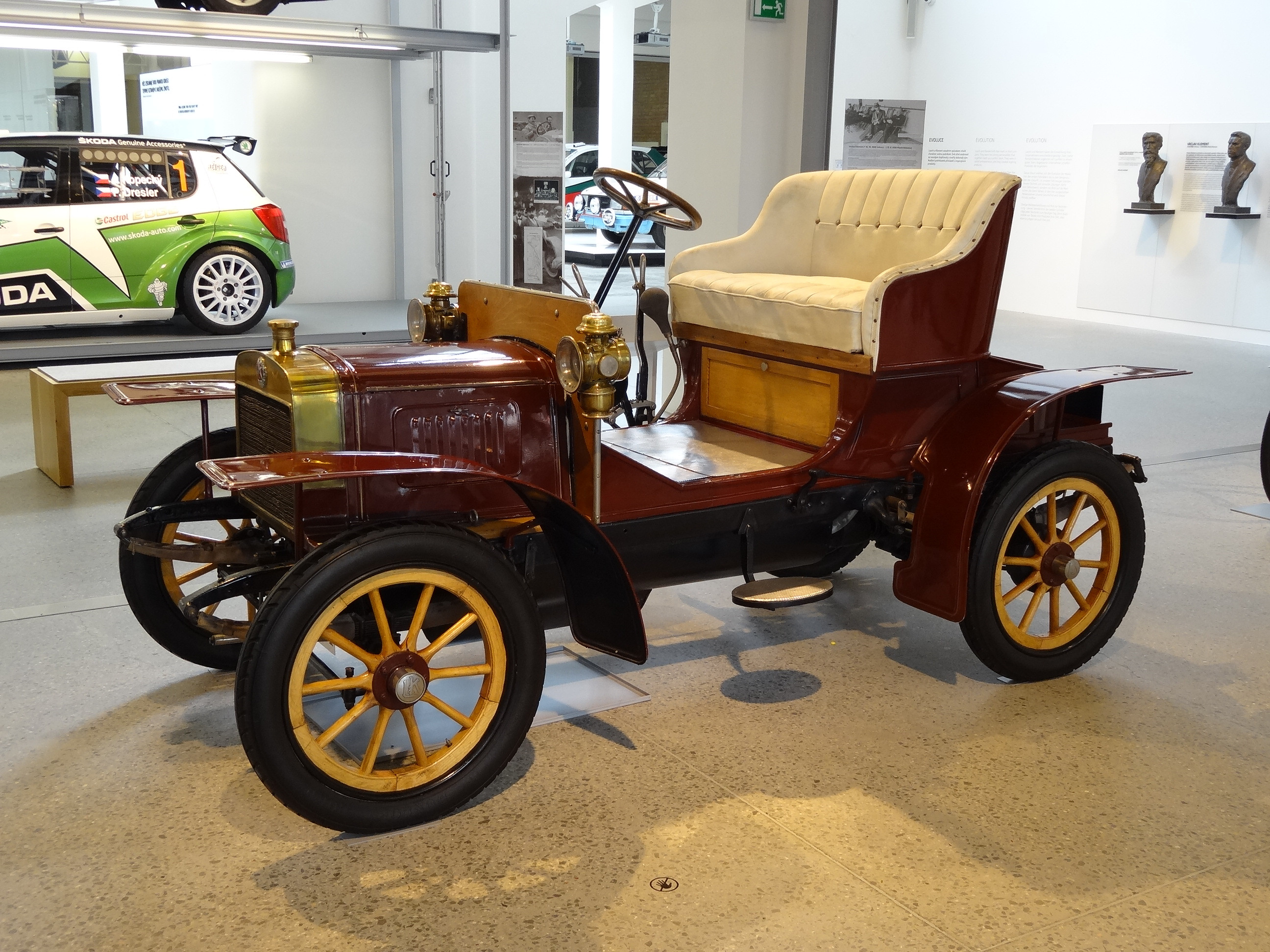 "Laurin & Klements erstes Automobil wird sofort zu einem Verlaufsschlager. Die Voiturette ist zuverlässig und elegant, dazu deutlich preiswerter als die teure Konkurrenz. Bald feiert der "kleine Wagen" sportliche Erfolge. Später sind auch Nutzfahrzeuge im Angebot." (Hinweistafel)